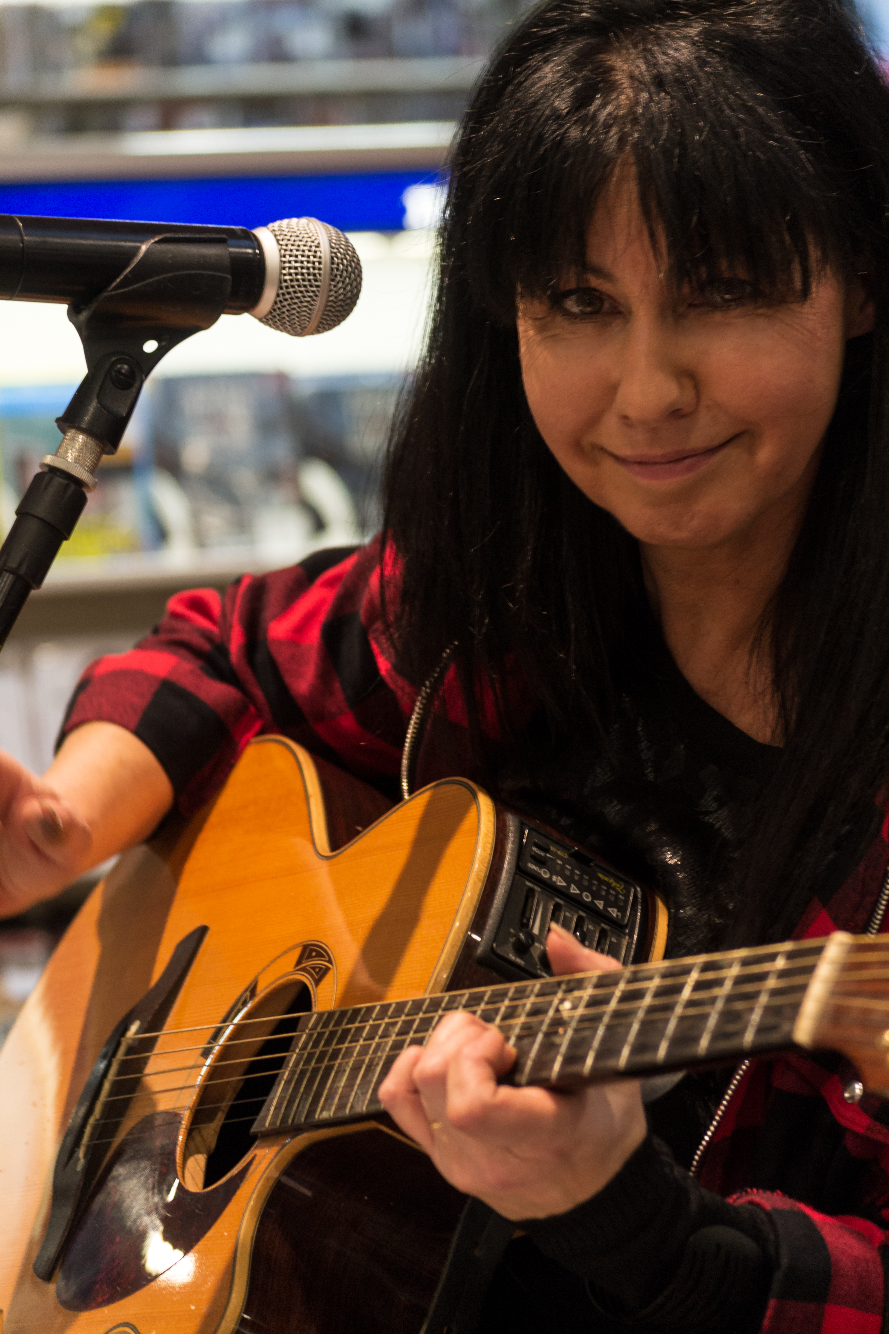 Showcase de Nathalie (Brignonen) Moguerou à l'espace culturel Leclerc Morlaix pour la sortie de son premier album solo en 2016, Peau de granit. Ex chanteuse du groupe pop morlaisien Canaille et du groupe de rock celtique Glaz.